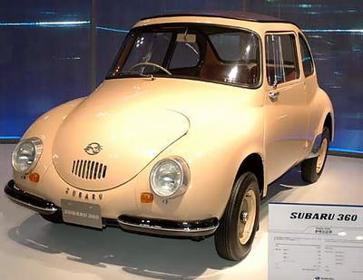 スバル360